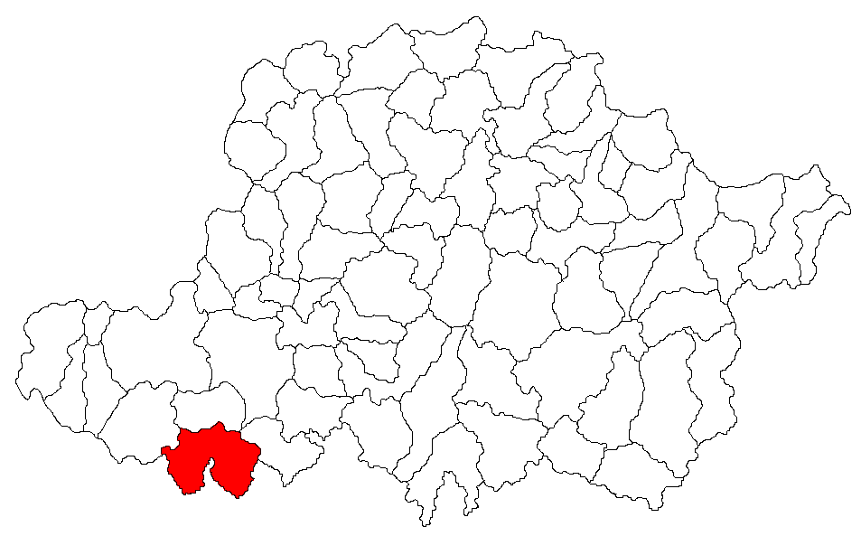 Categorie:Hărţi ale judeţului Arad